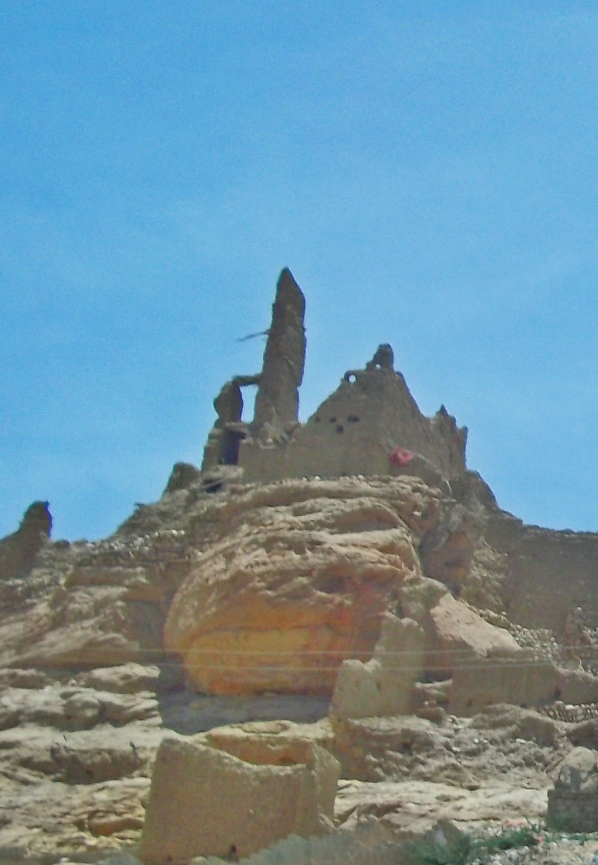 بقايا وأثار المصنعة اليوم ، الصورة التقطت سنة 2013 م.